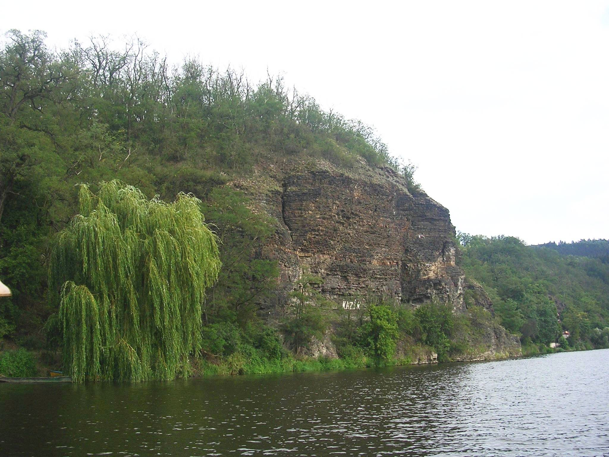 Kazín. Skalní ostroh nad Berounkou v katastrálním území obce Jíloviště.